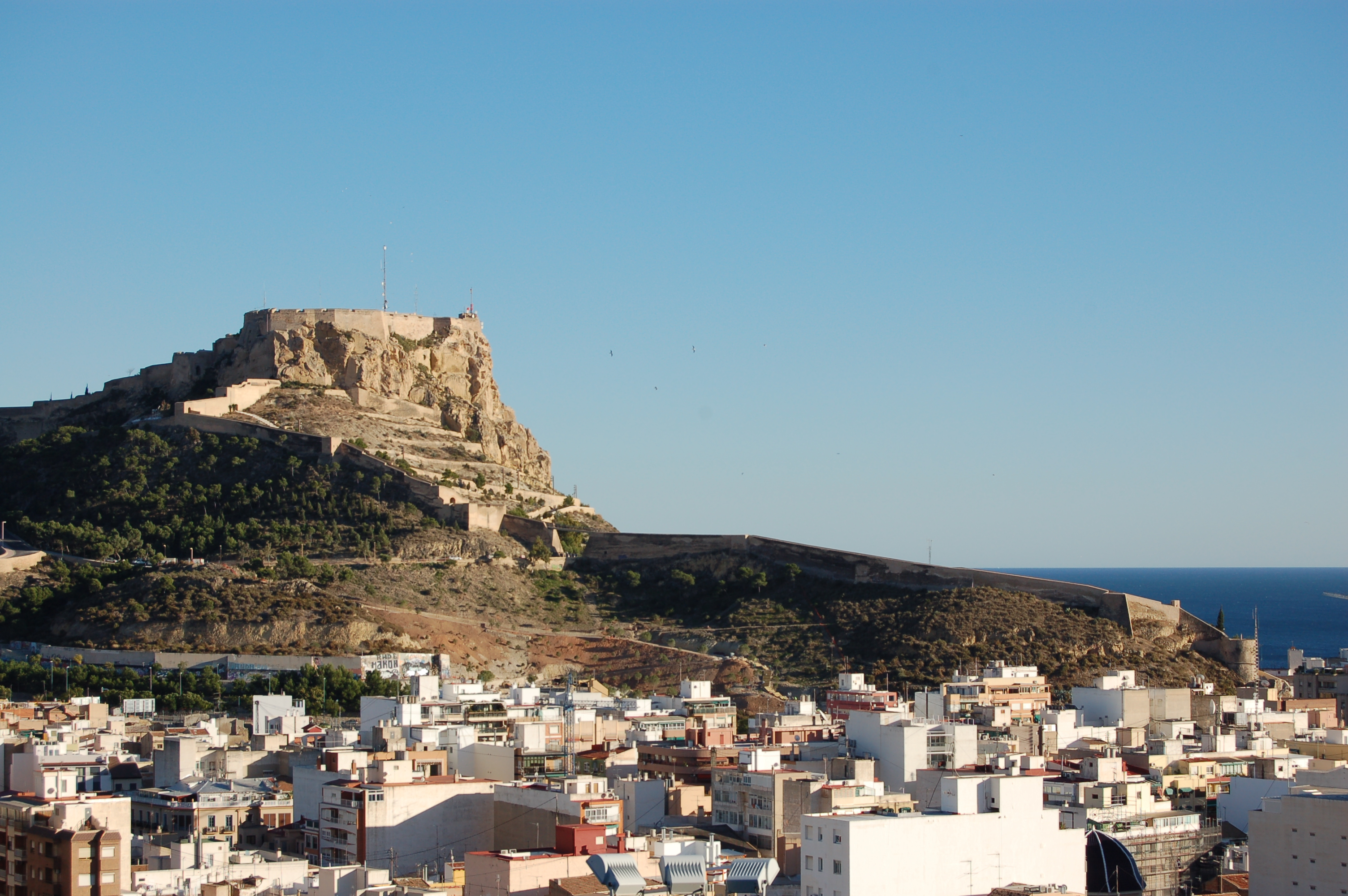 Das Castillo de Santa Bárbara in Alicante, Spanien.